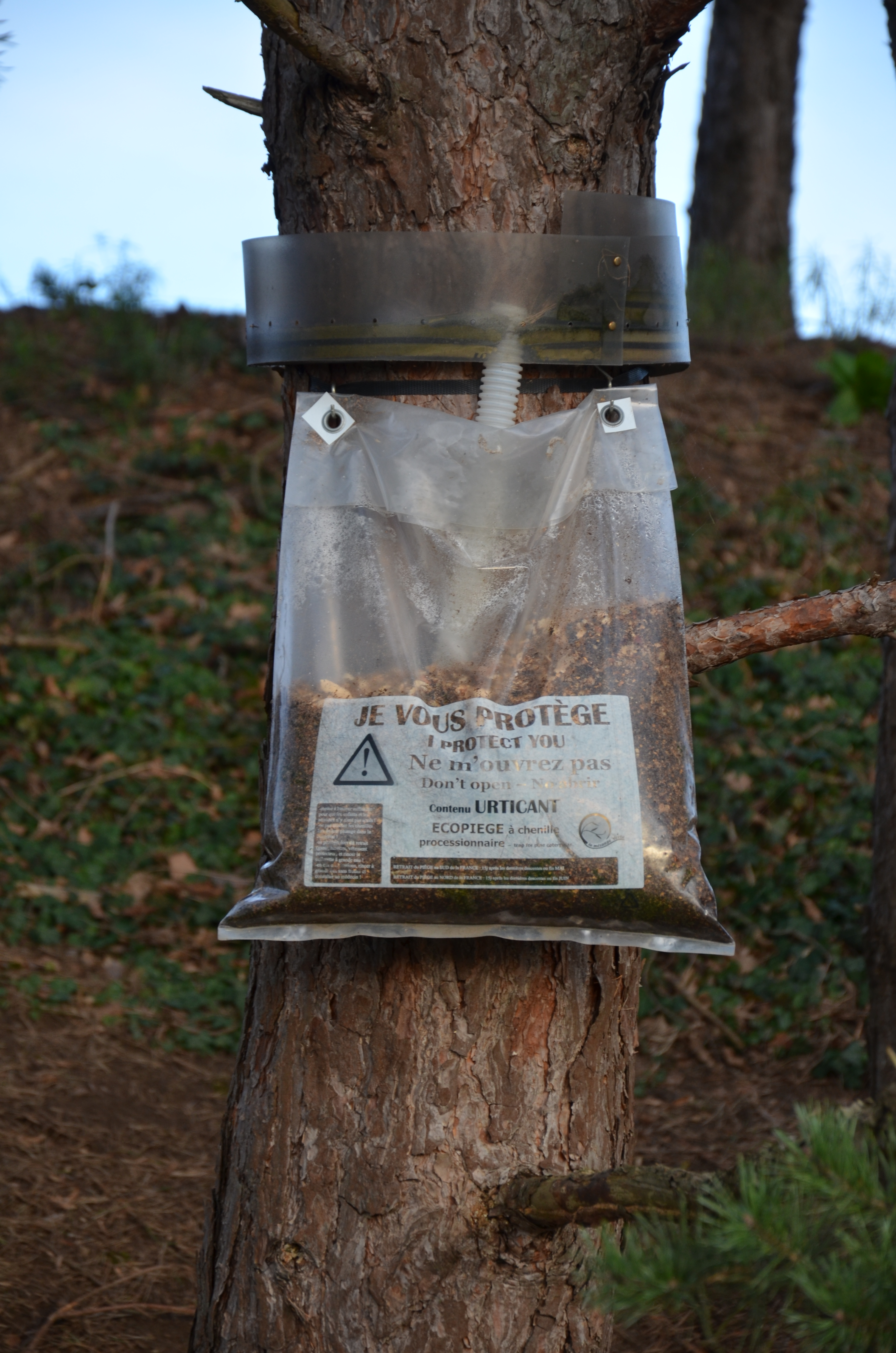 écopiège à chenille processionnaire.